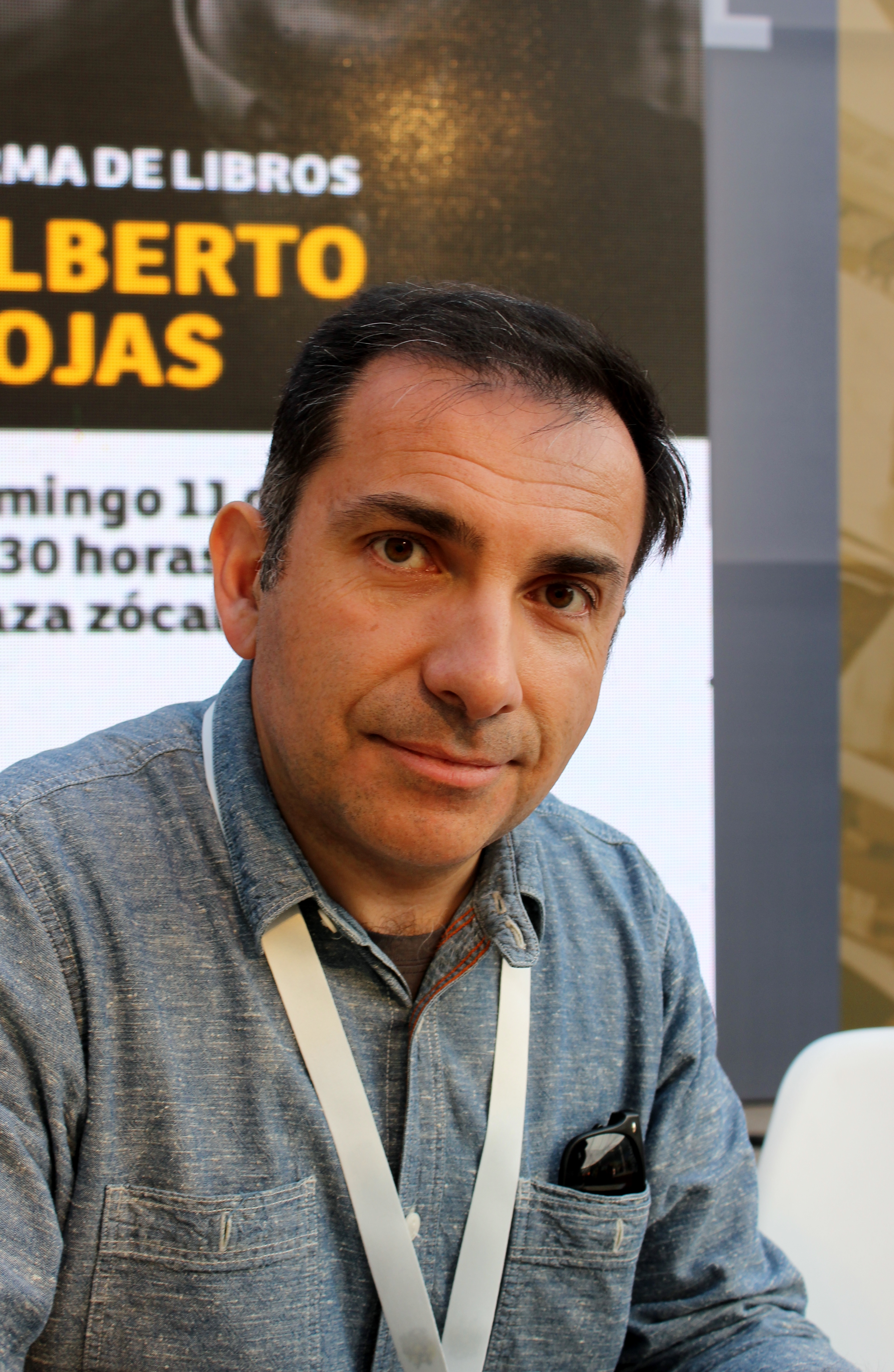 El periodista y escritor chileno Alberto Rojas durante una sesión de firma de libros en la segunda etapa del Festival de Autores de Santiago 2018 realizada en el GAM.